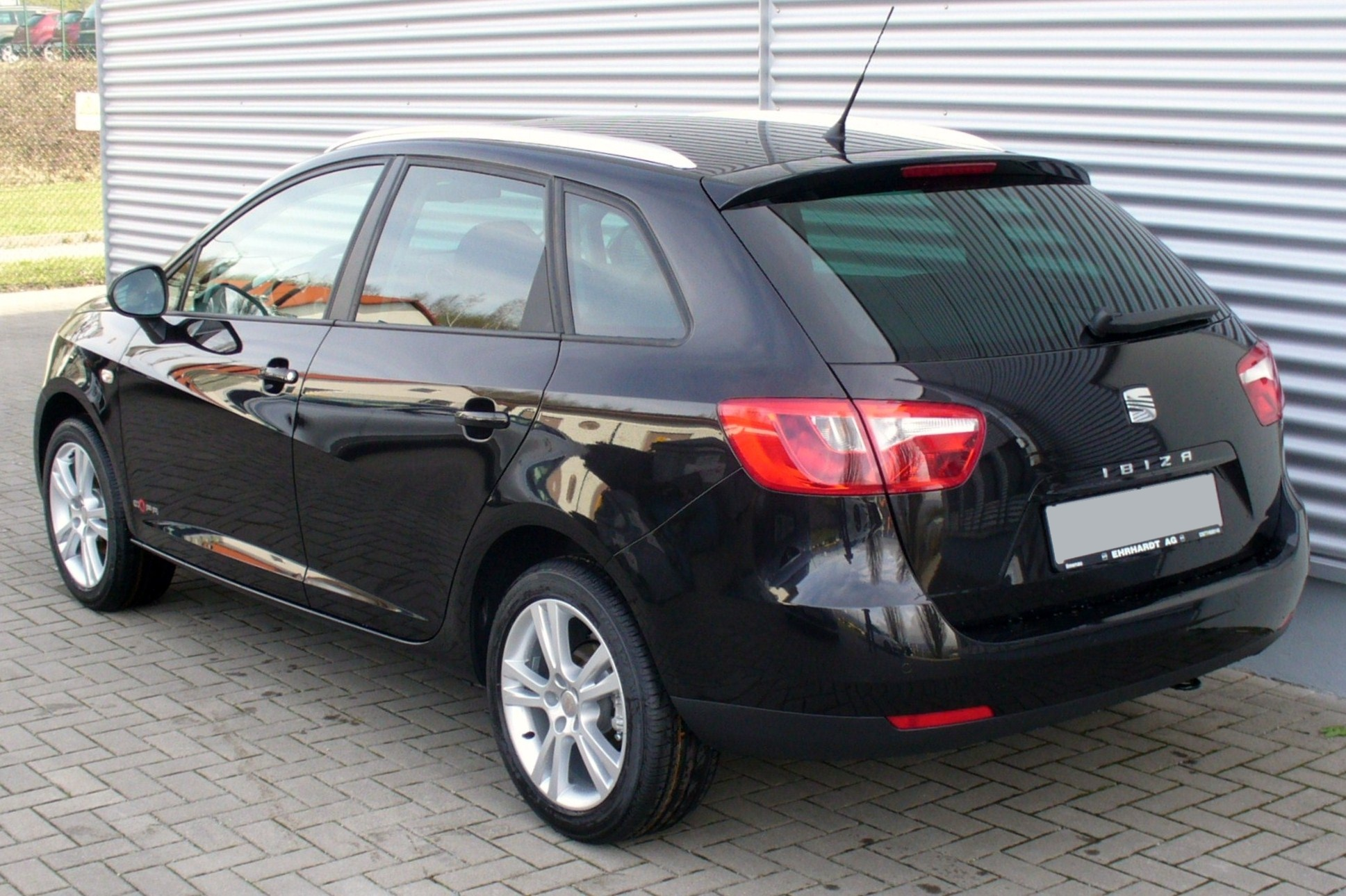 Seat Ibiza ST